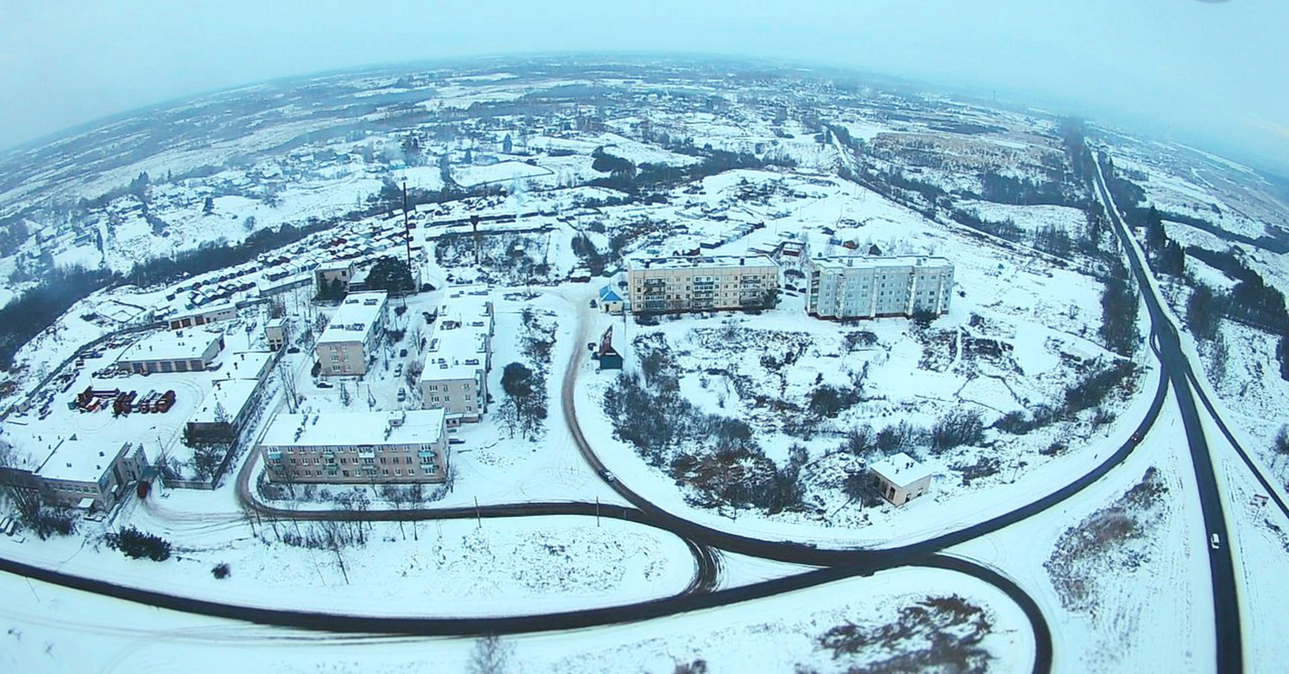 Поселок Дорожный зимой с высоты